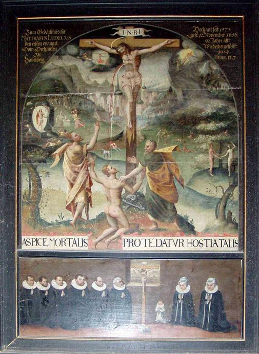 Epitaph für Matthäus Ludecus in einer der südlichen Steitenkapellen des Doms zu Havelberg. Im oberen Teil ist der Verstorbene nackt unter dem Kreuz dargestellt. Im unteren Teil des Bildes wird er gezeigt im Kreise seiner Familie. Der Maler ist unbekannt. Das Bild ist entstanden zu Beginn des 17. Jahrhunderts.